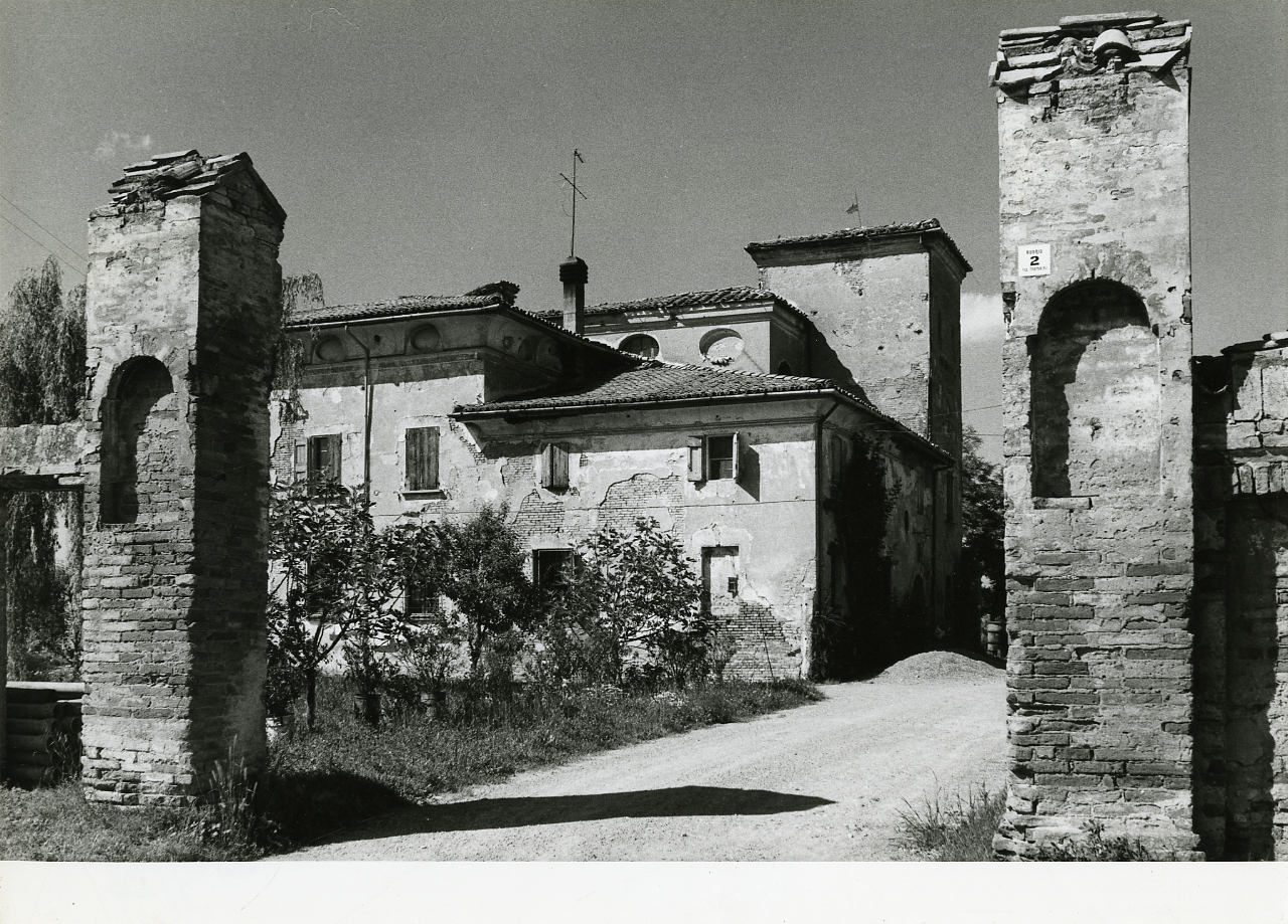 Servizio fotografico : Budrio, 1974 / Paolo Monti. - Stampe: 3 : Positivo b/n, gelatina bromuro d'argento/ carta, 24x30. - ((Al verso delle stampe manoscritti i numeri dei negativi corrispondenti: 1612/15, 2533/33, 2567/28. Sul coperchio della scatola, manoscritto a pennarello: "Emilia-Bologna"